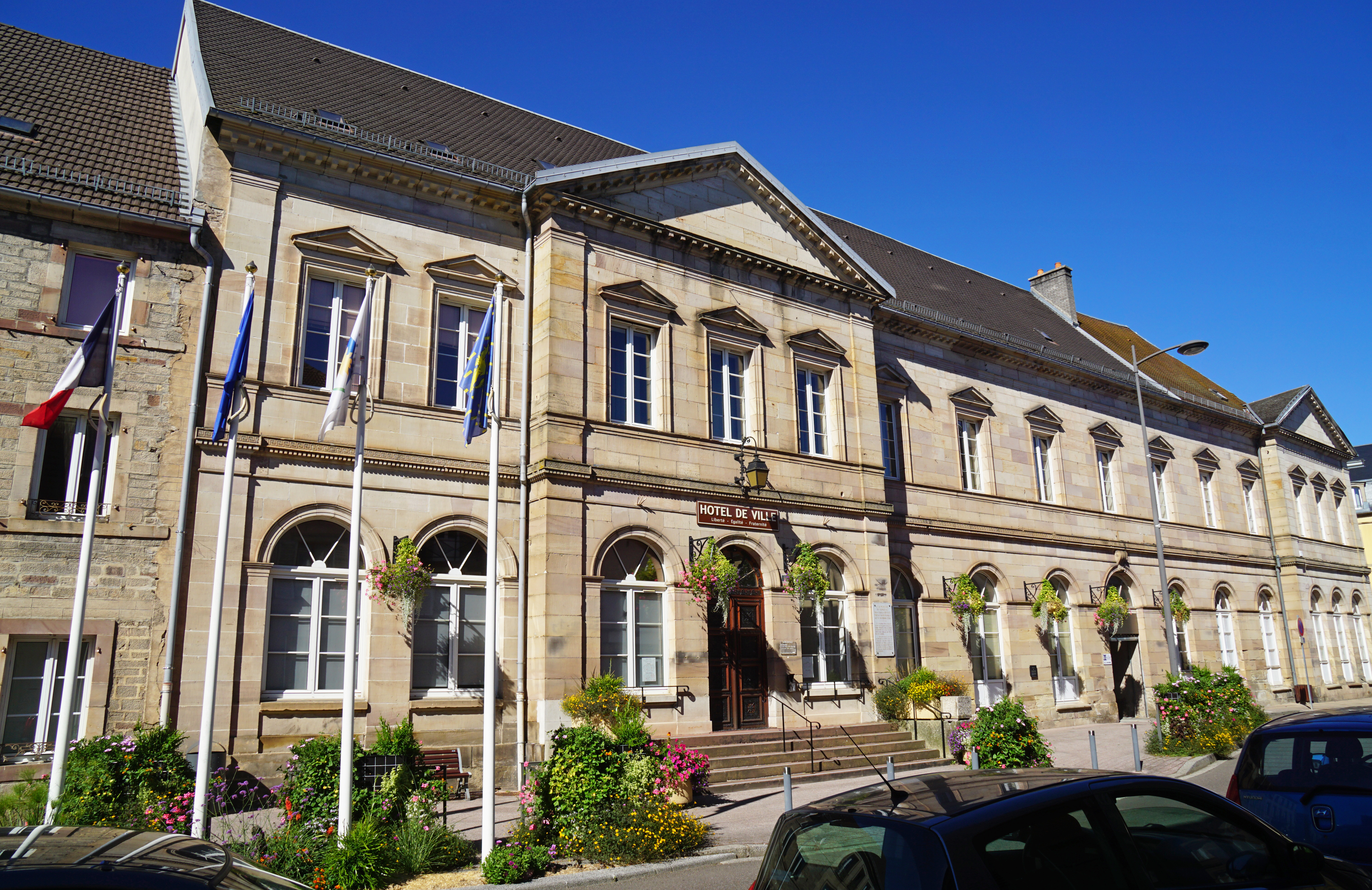 La mairie de Lure.